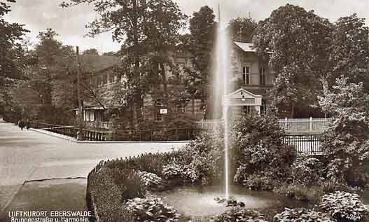 Harmonie Haus Schwärzetal in Eberswalde